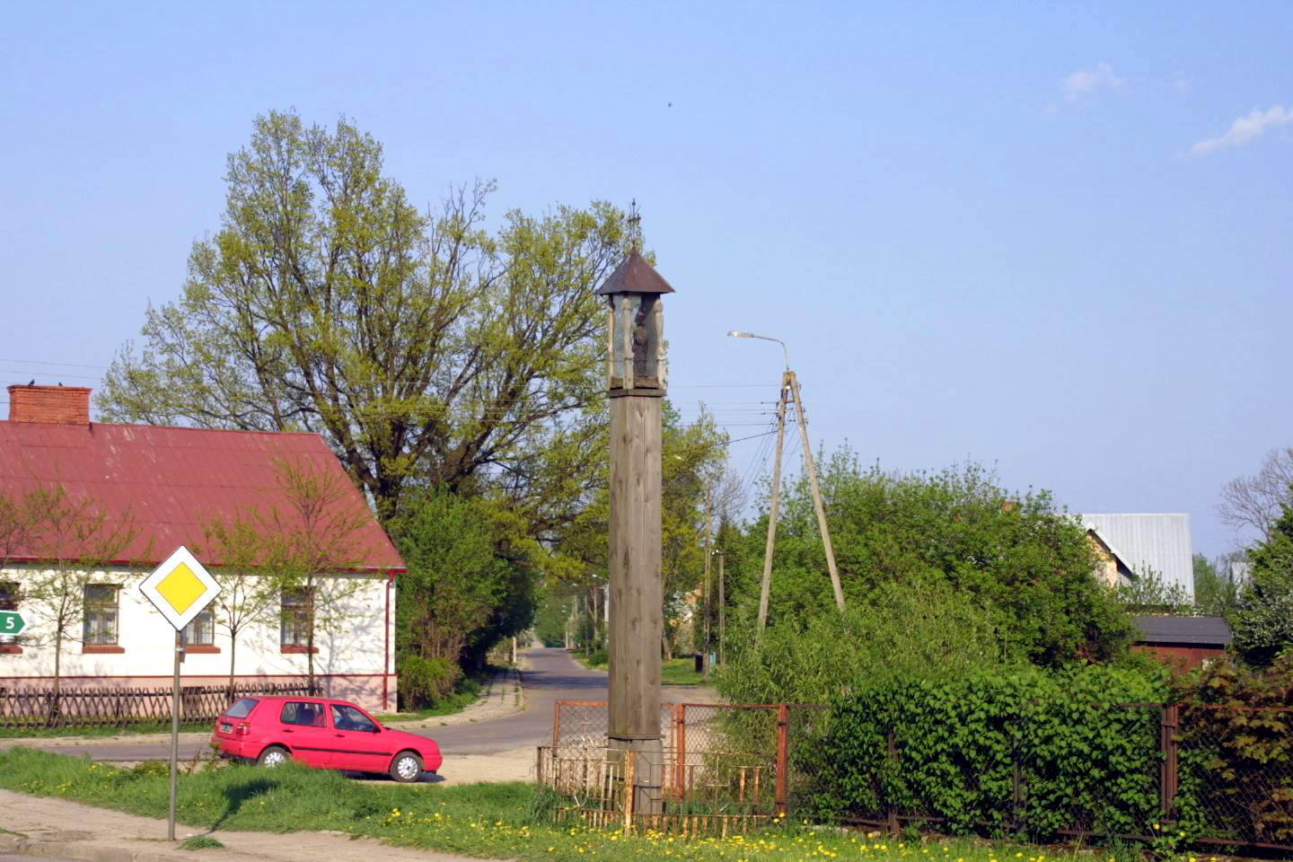 Bargłów Kościelny. Słupowa kapliczka skrzynkowa z ludową rzeźbą św. Jana Nepomucena